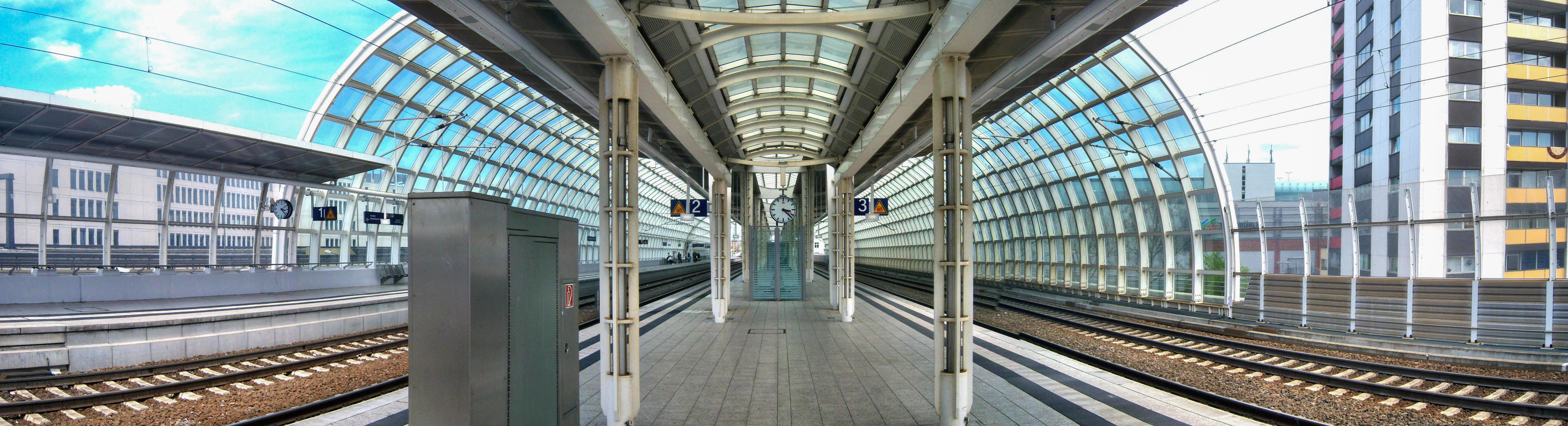 Panorama-Aufnahme des Bahnhofes Ludwigshafen (Rhein) Mitte